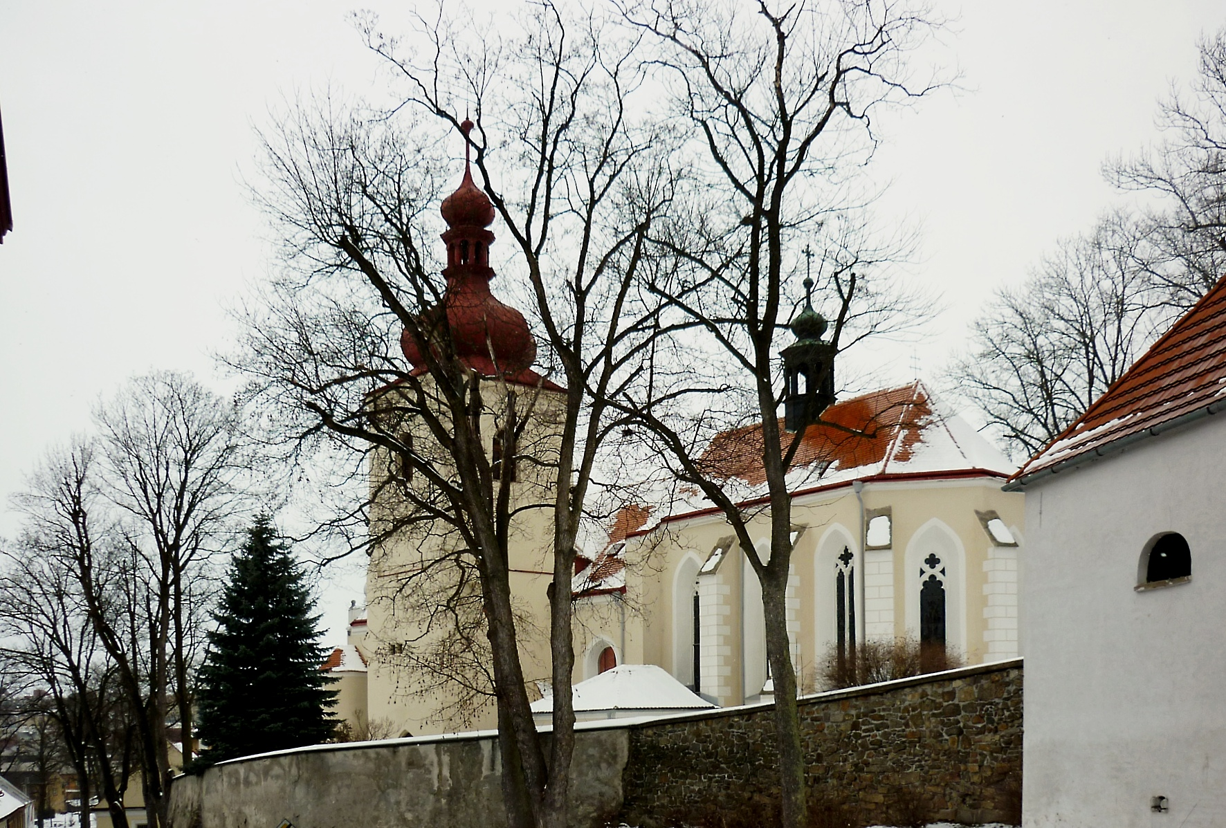 Farní Kostel Svatého Martina v Třešti nedaleko zámku